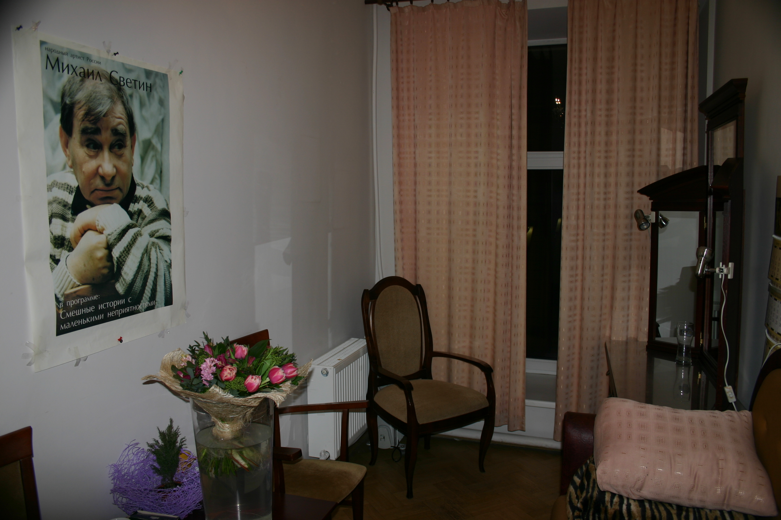 Гримуборная М. С. Светина.